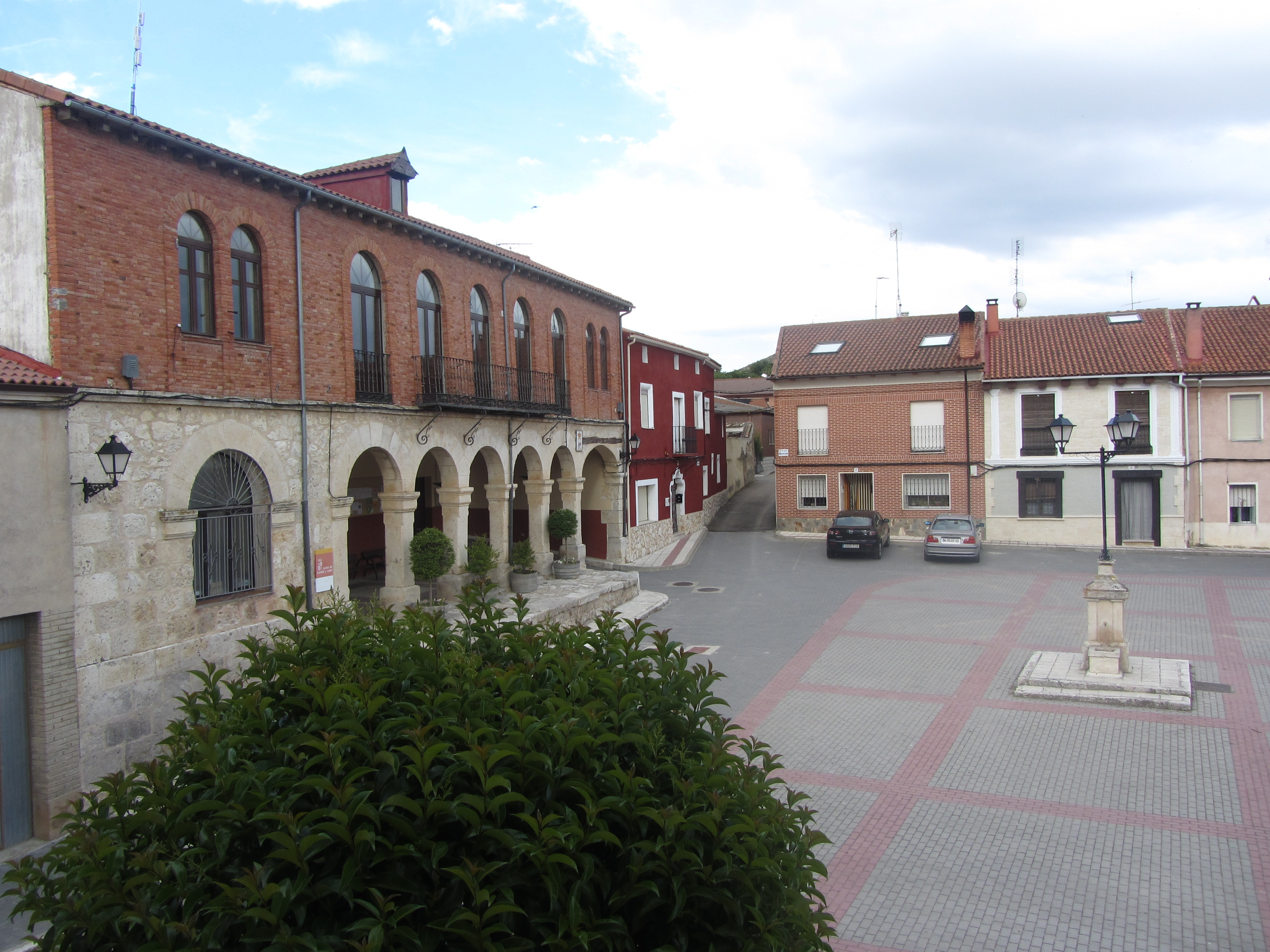 Ayuntamiento